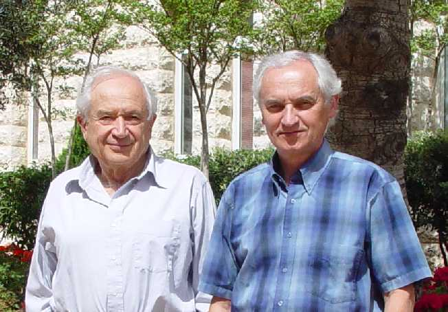 Popis: Raphael Mechoulam, objevitel psychoaktivní látky, (-)-trans-delta-9-tetrahydrocannabionolu, z Cannabis sativa L. (1964) a Lumír Ondřej Hanuš, objevitel endogenního ligandu, anandamidu, v mozku (1992). Obě látky se vážou v mozku na cannabinoidní receptory. Zdroj: soukromý archiv Datum: 2005 Autor: Valery Dembitsky